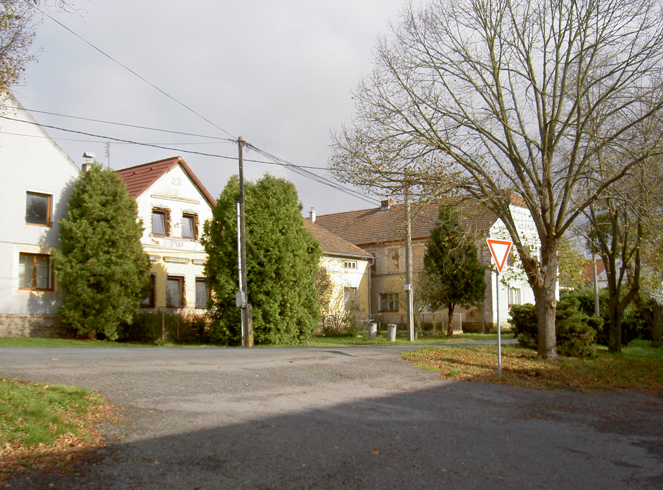 Polžice